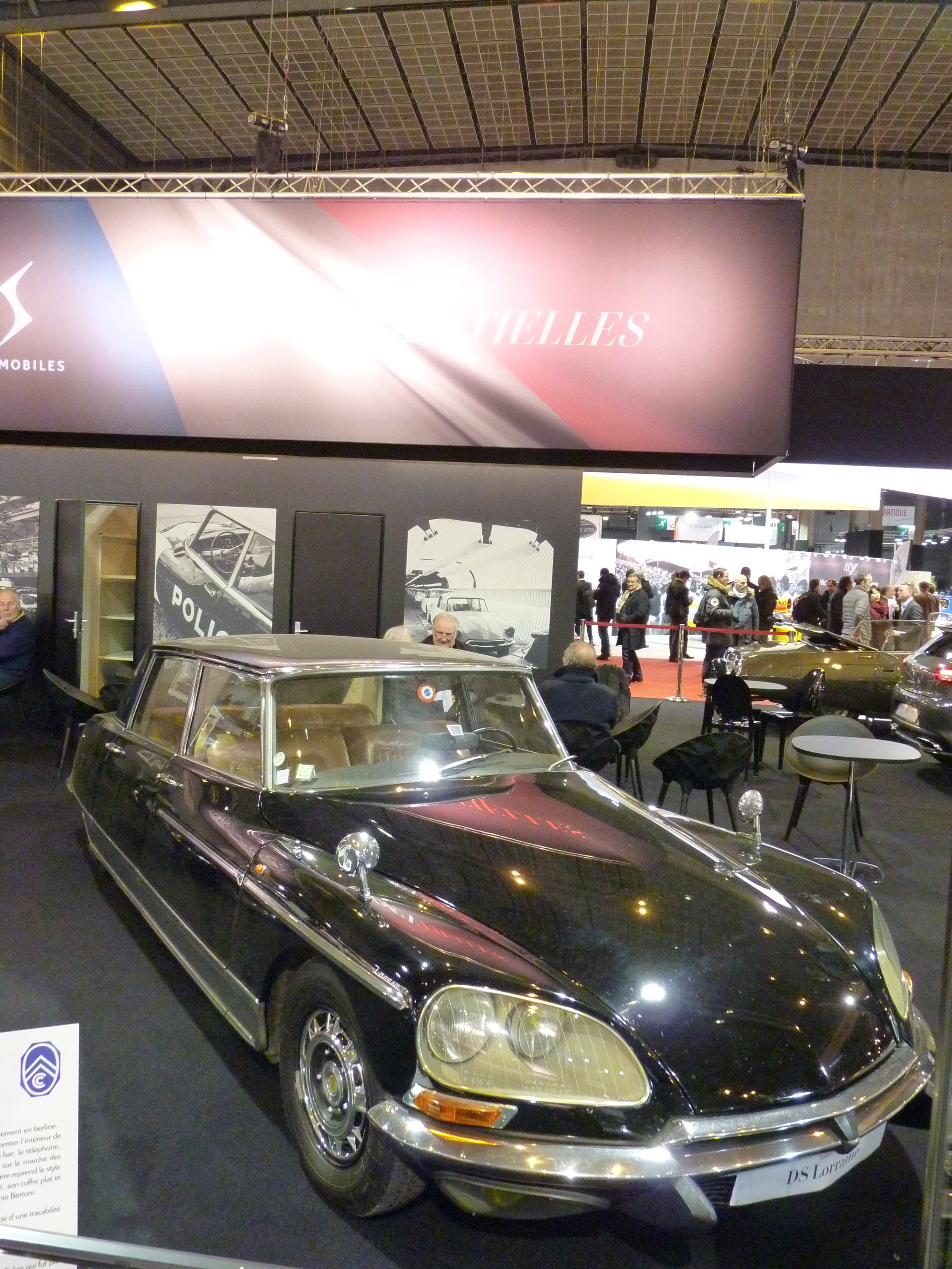 Rétromobile 2018